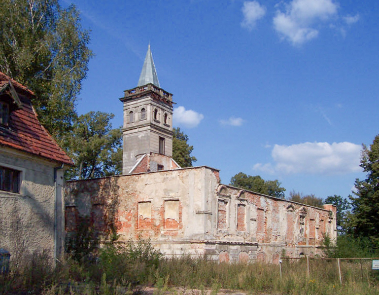 Pałac w Barcinku - od strony ogrodu